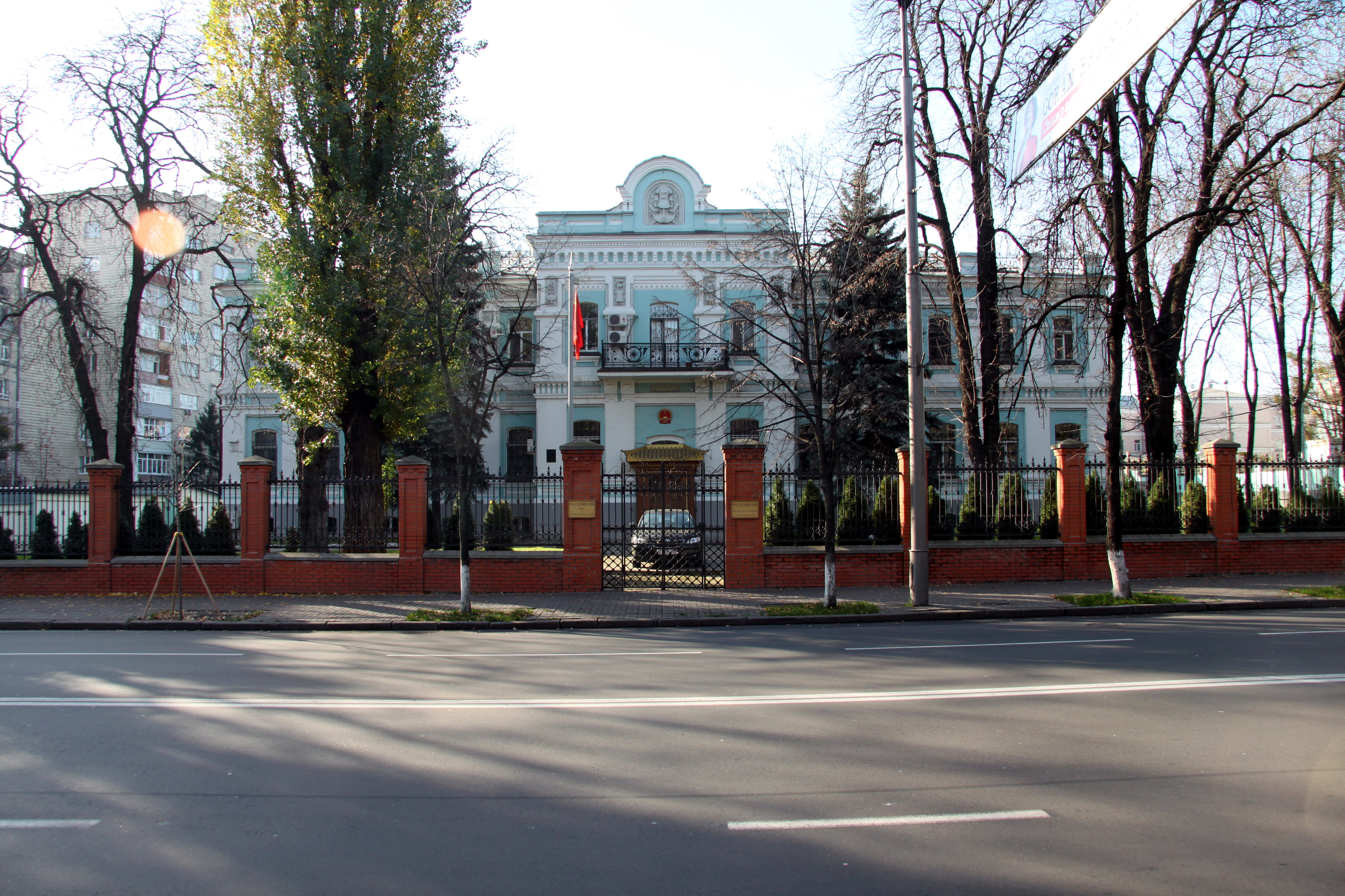 Будинок командувача військ Київського військового округу, де жили: у 1889–1903 роках — Драгомиров М. І., генерал-губернатор, українофіл, член Державної ради; радянські діячі: у 1935–1937 роках — Й. Е. Якір, у 1937–1938 роках —, Грушевського Михайла вул., 32, Київ